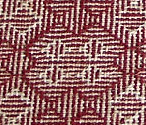 Detalj av skuggväv.. Detalj från löpare i skuggväv